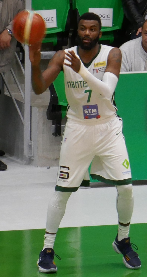 Jamal Shuler avec Nanterre en 2017